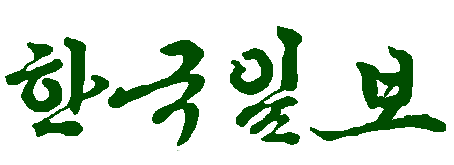 한국일보 구 로고 가로판 (1954 ~ 1990년대 후반경)